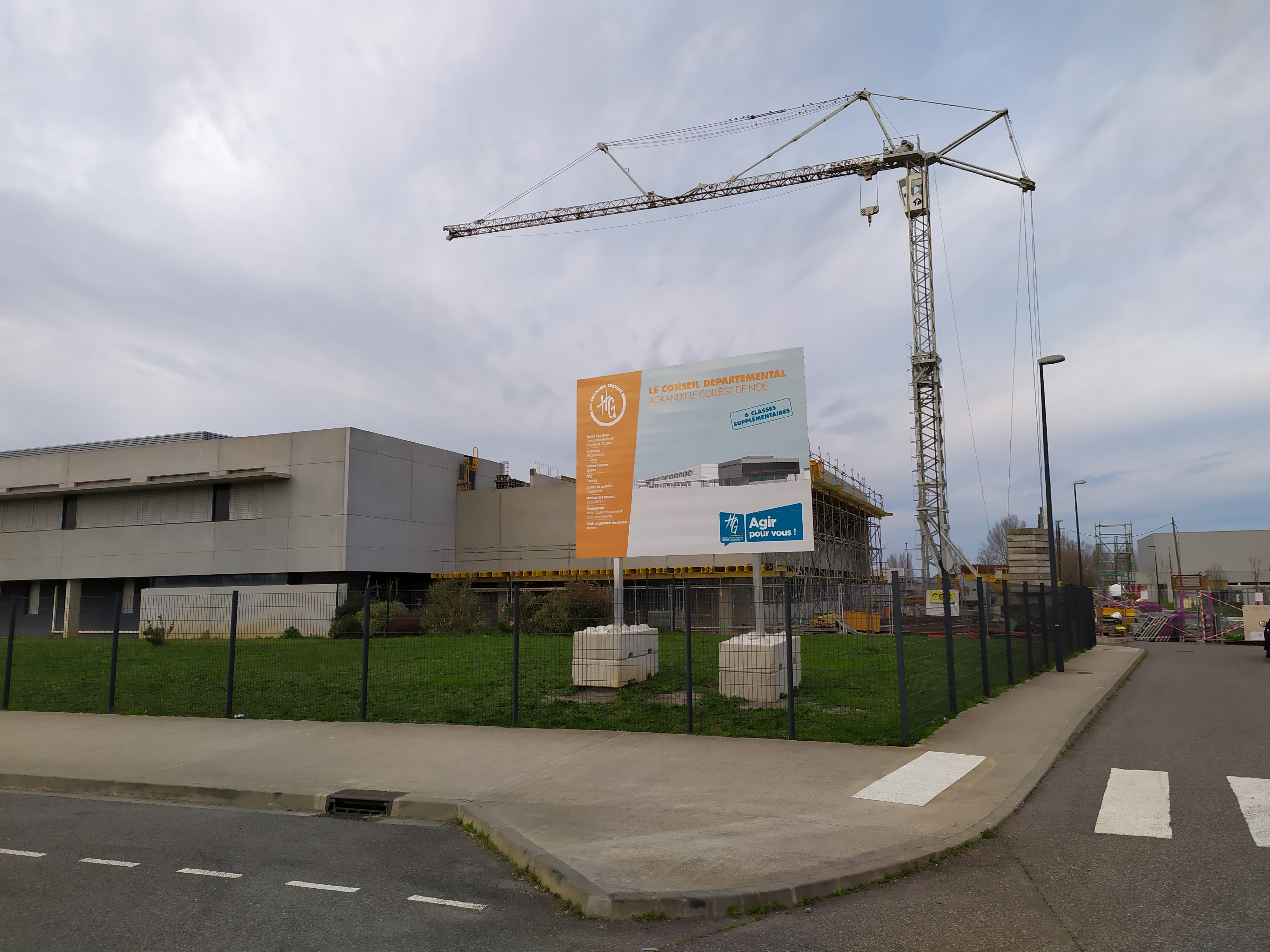 Collège de Noé